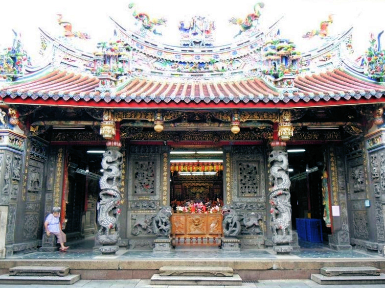 中文（台灣）: 慈濟宮位在臺中市豐原區。